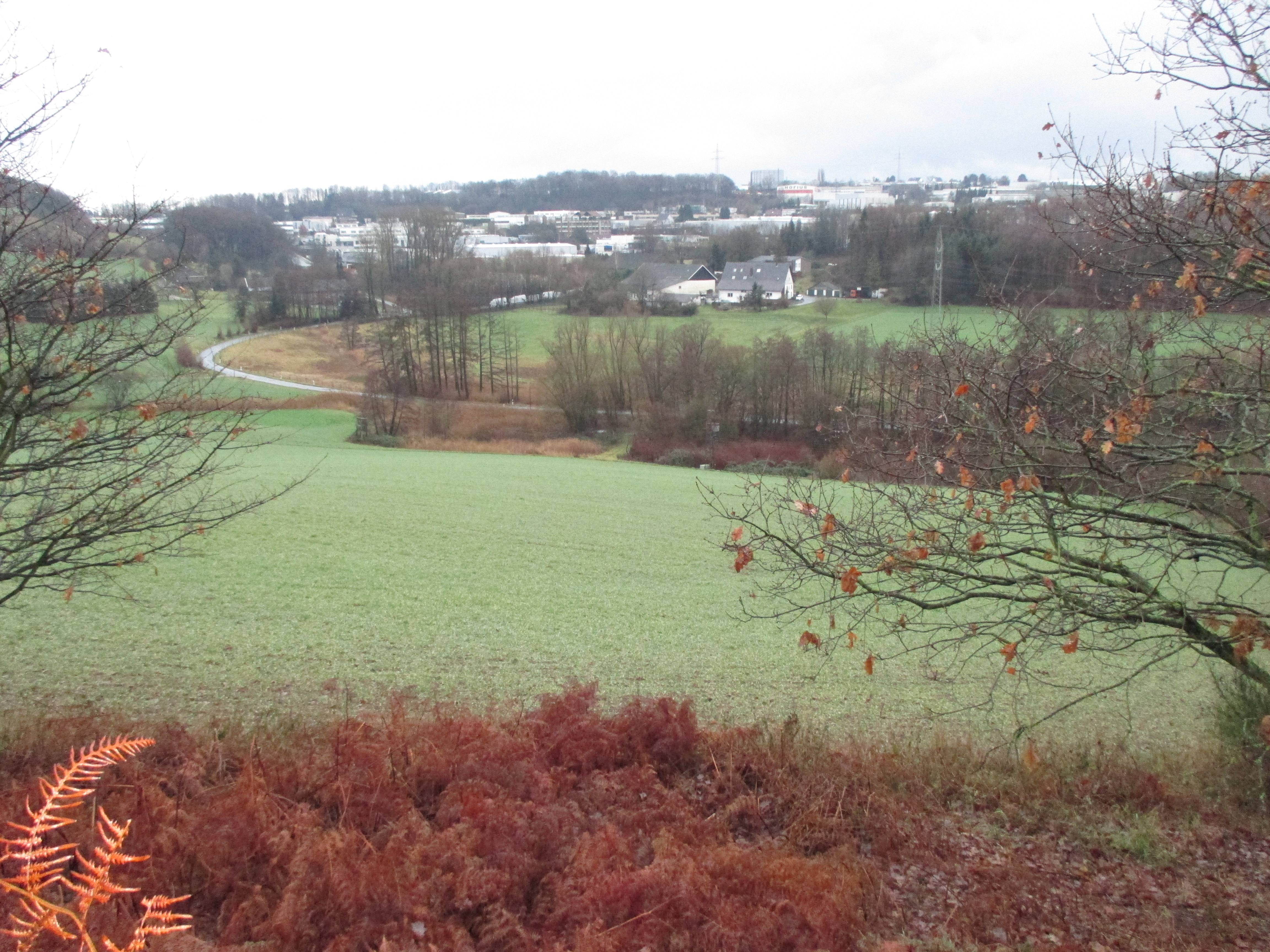 Röbbeck Hof Gewerbegebiet Bach